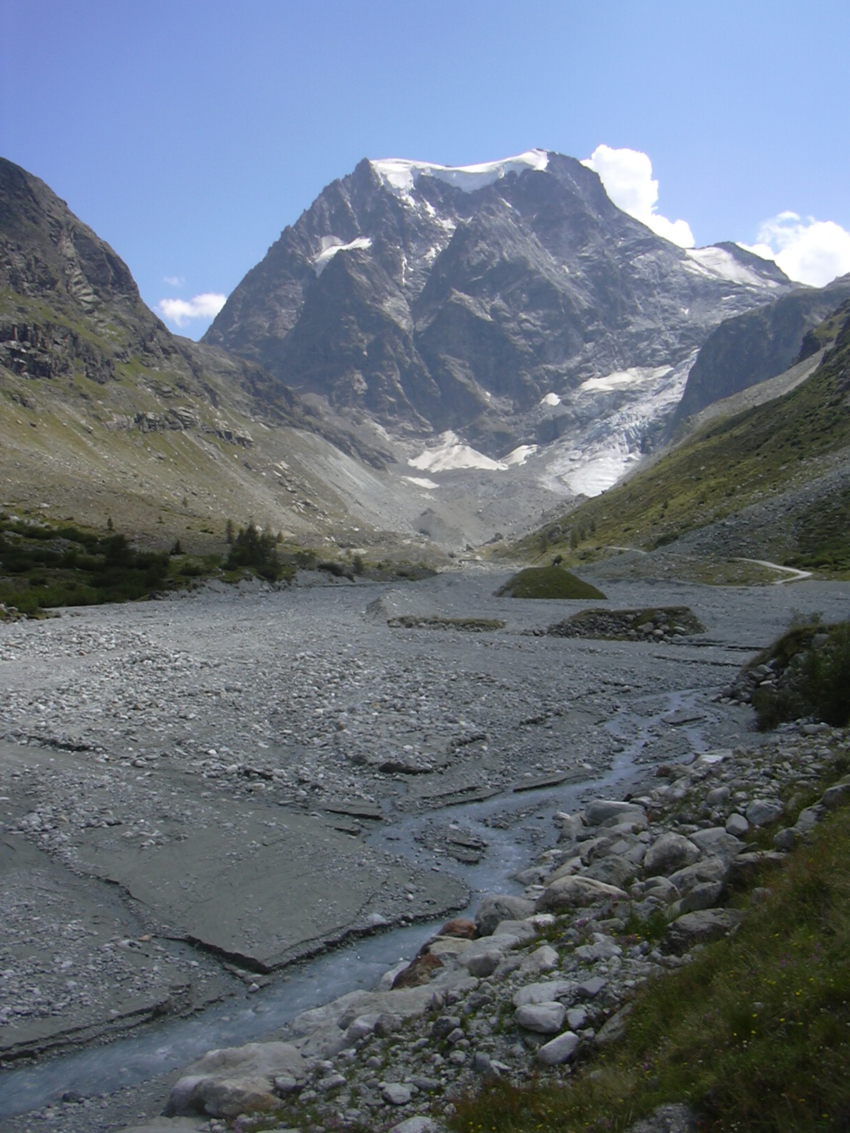 Arolla, Val d'Hérens, upper Borgne Valley and Glacier (Switzerland)